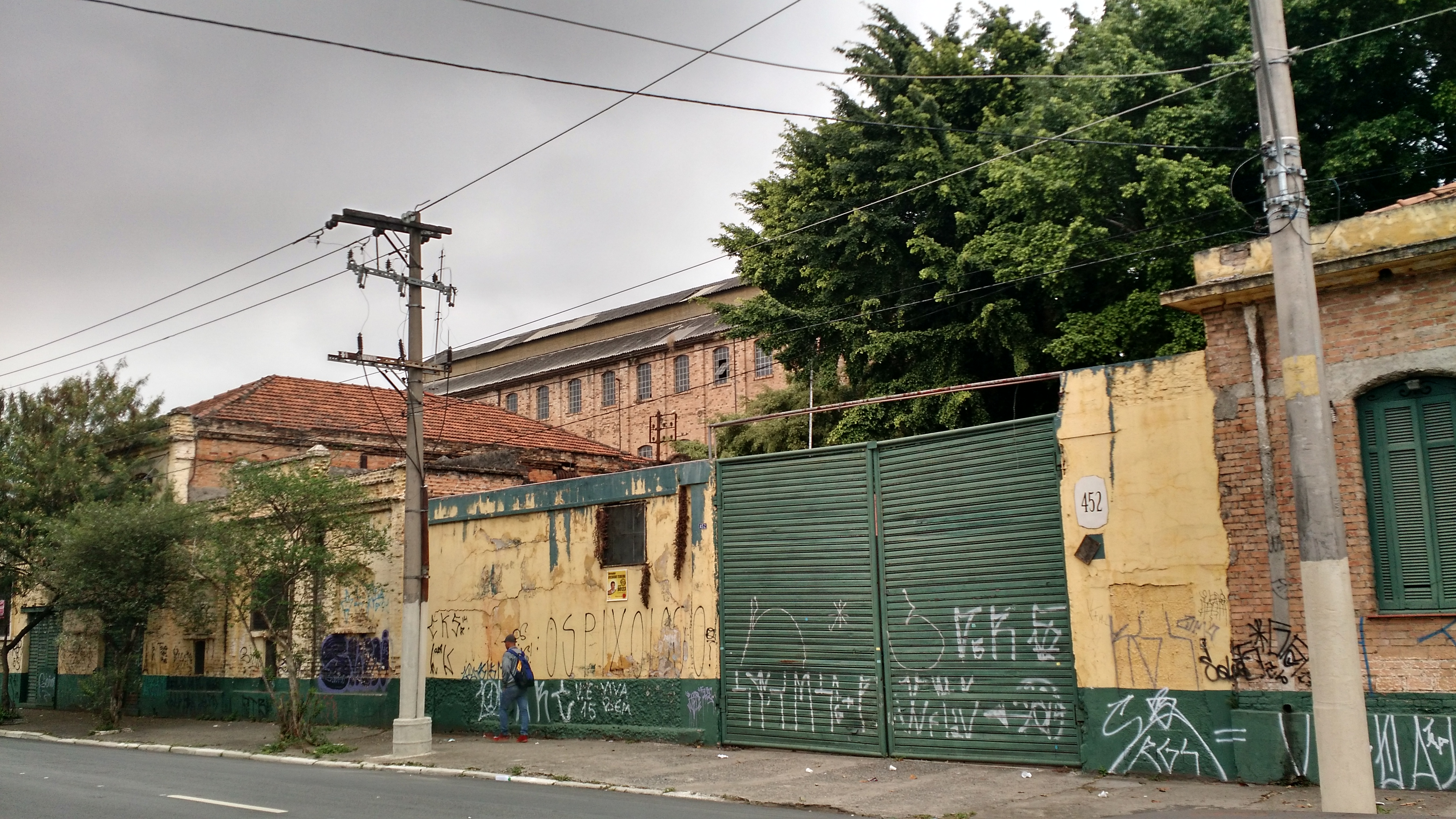 Área externa dos Moinhos Minetti Gamba